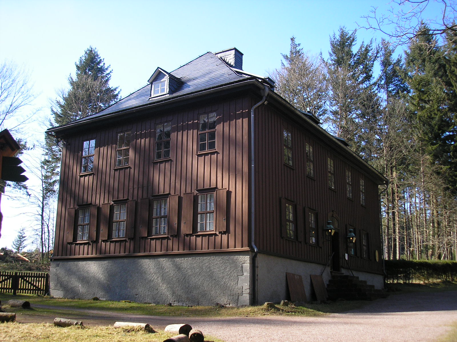 Das Jagdhaus Gabelbach bei Ilmenau (Thüringen).